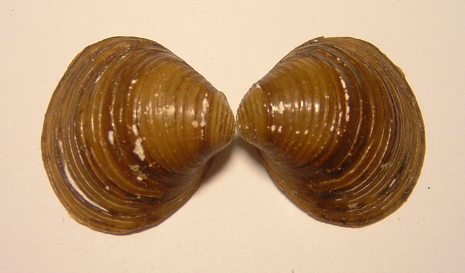 Toegeknepen korfmossel (Corbicula fluminalis)